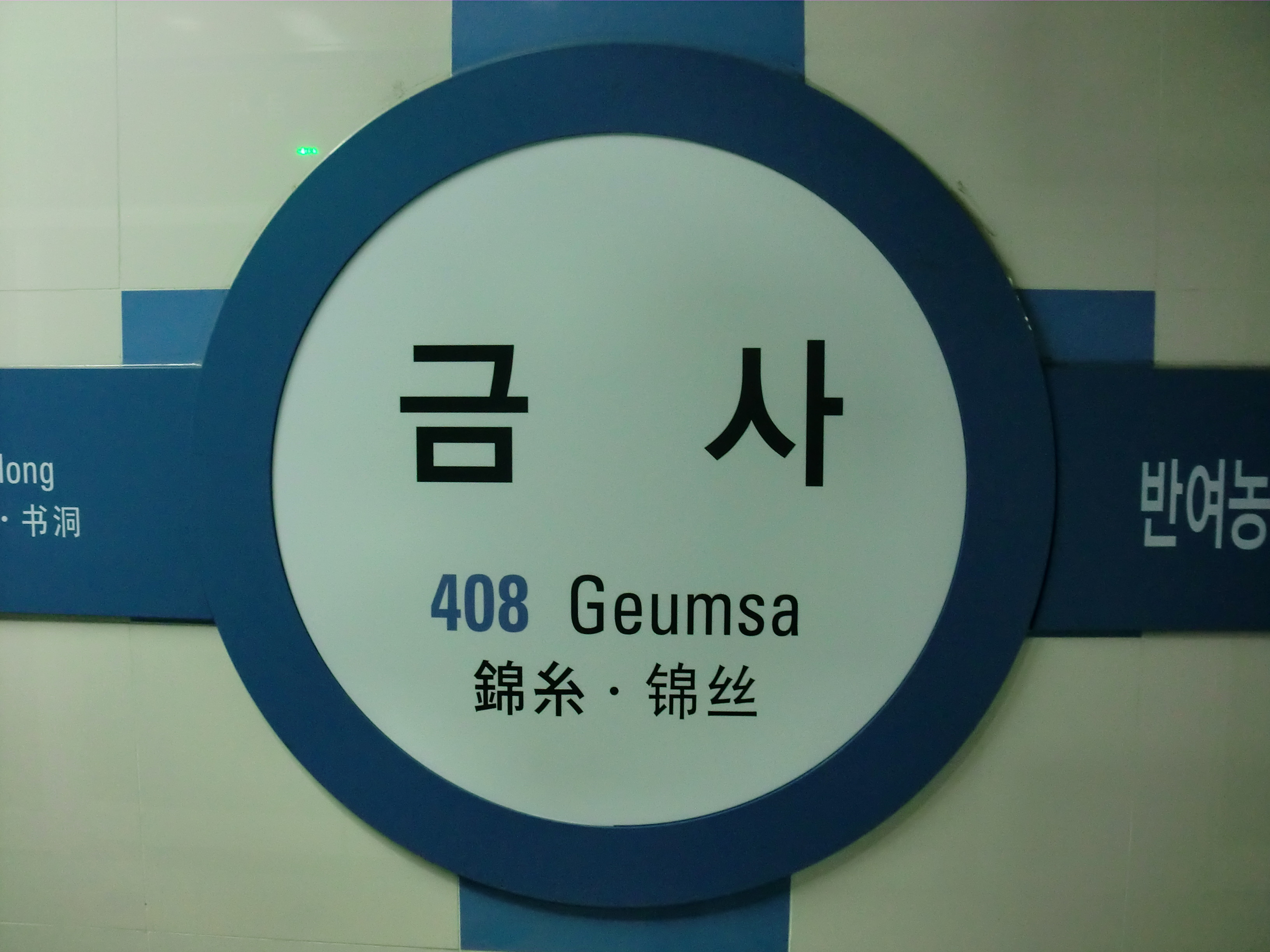 부산도시철도 4호선 금사역의 역명판